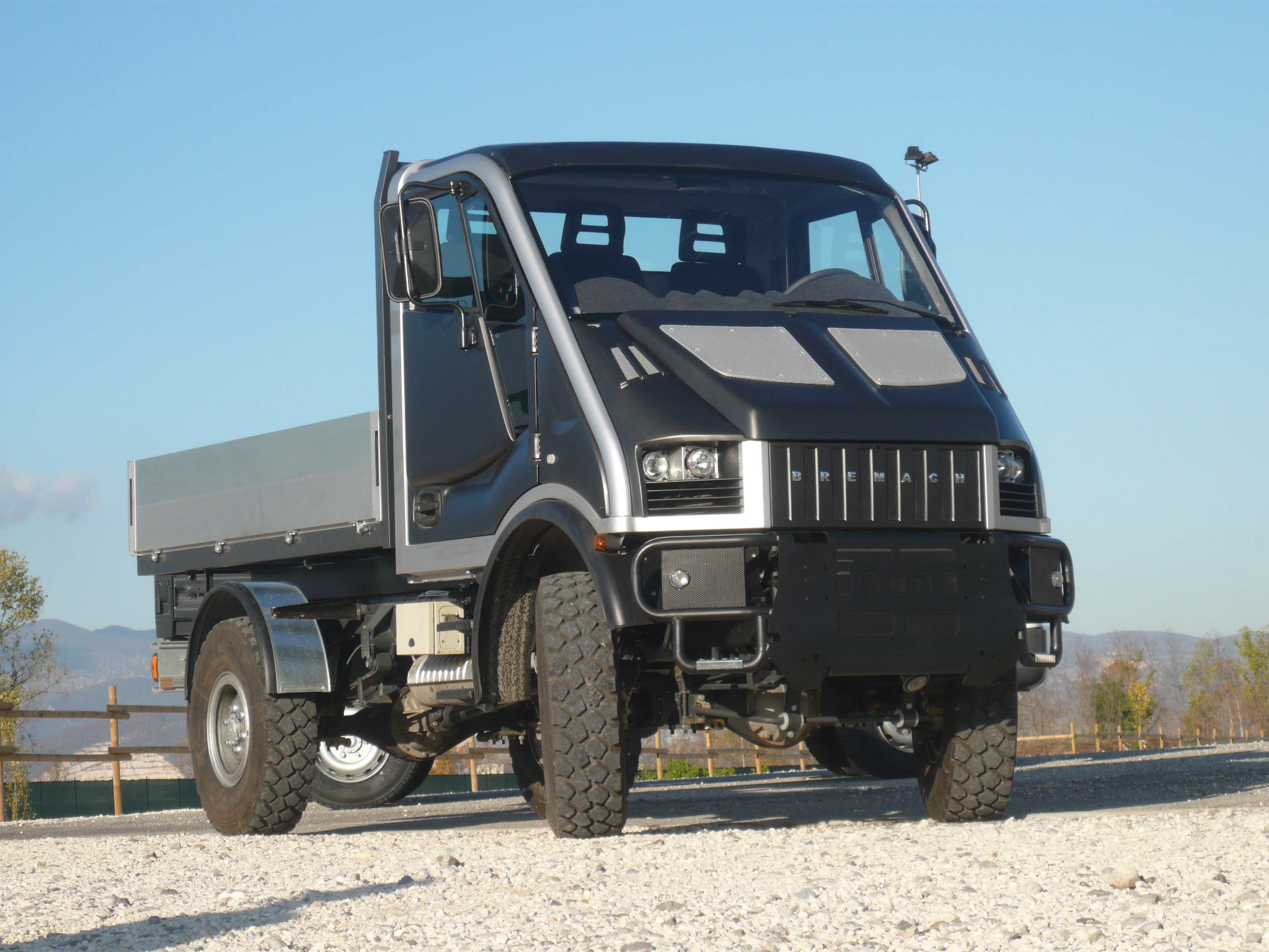 L'ultima creazione di casa BREMACH: stile aggressivo ed eleganza